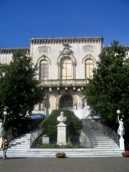 Zafferana Etnea Dettagli Il Palazzo Municipale